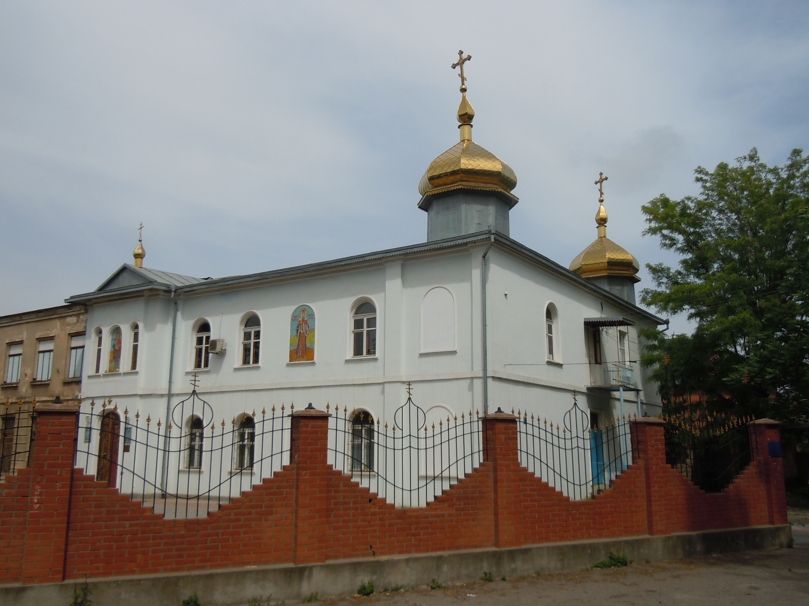 Церква Св. Георгія Переможця, Слобідка, Одеса